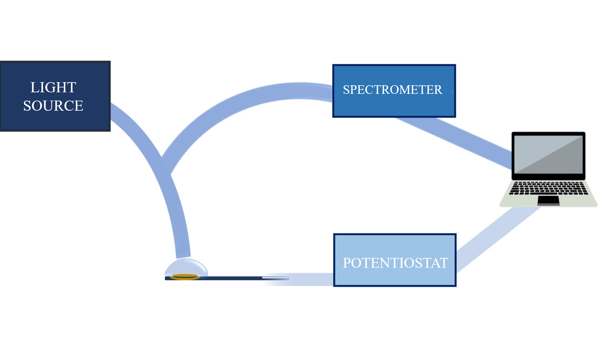 Normal reflection scheme